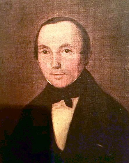 Byggmästare Abraham Bengtsson Nyström (1789-1849)